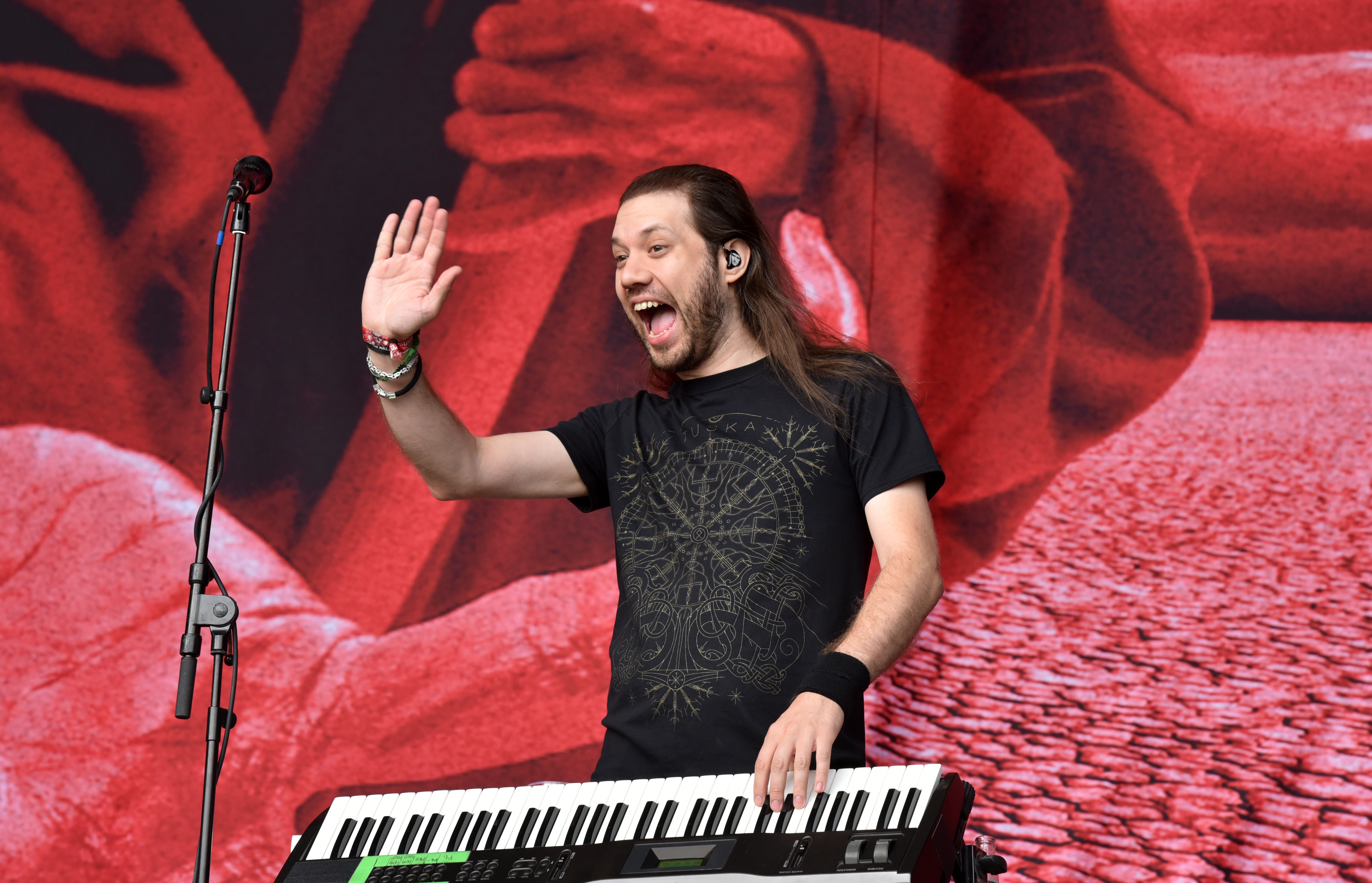 Children of Bodom beim Elbriot 2017